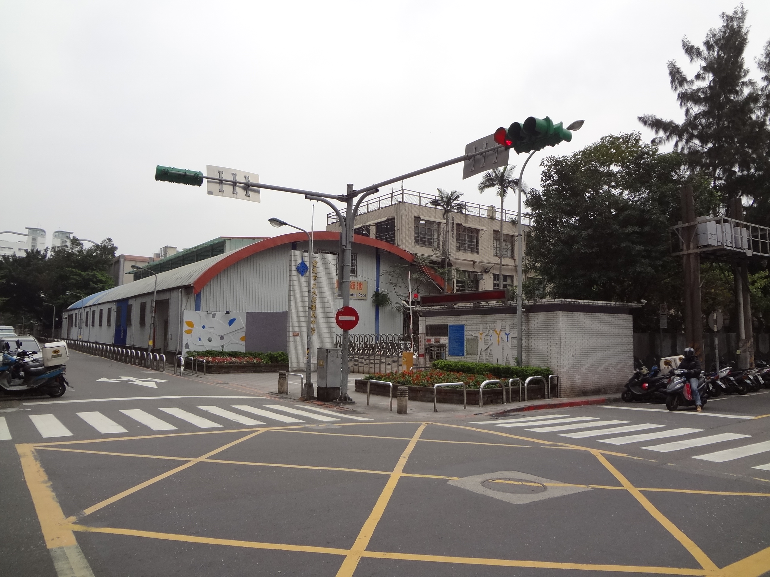 臺北市立大安國民中學，位於臺灣臺北市大安區大安路二段63號。